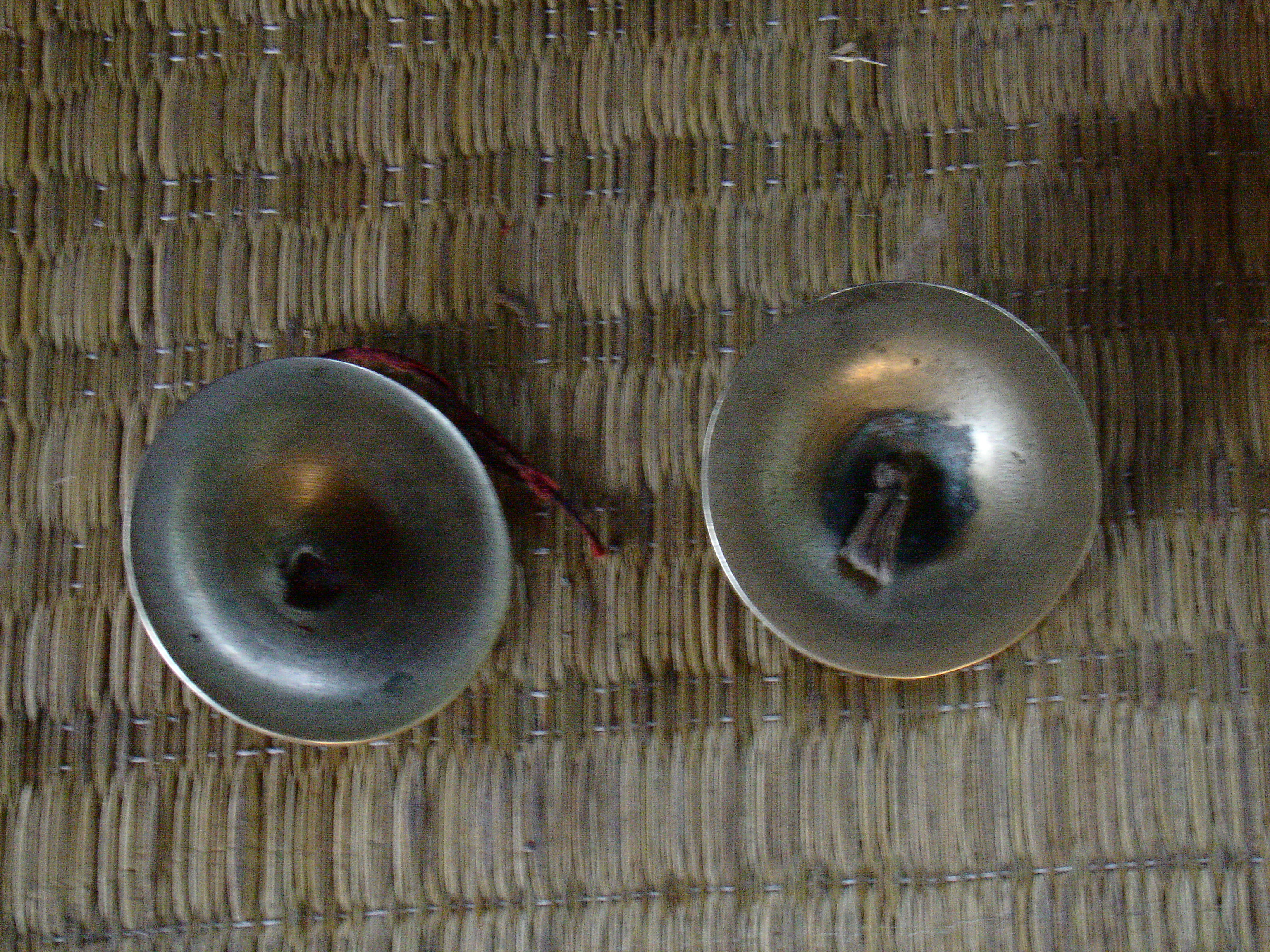 खरताल